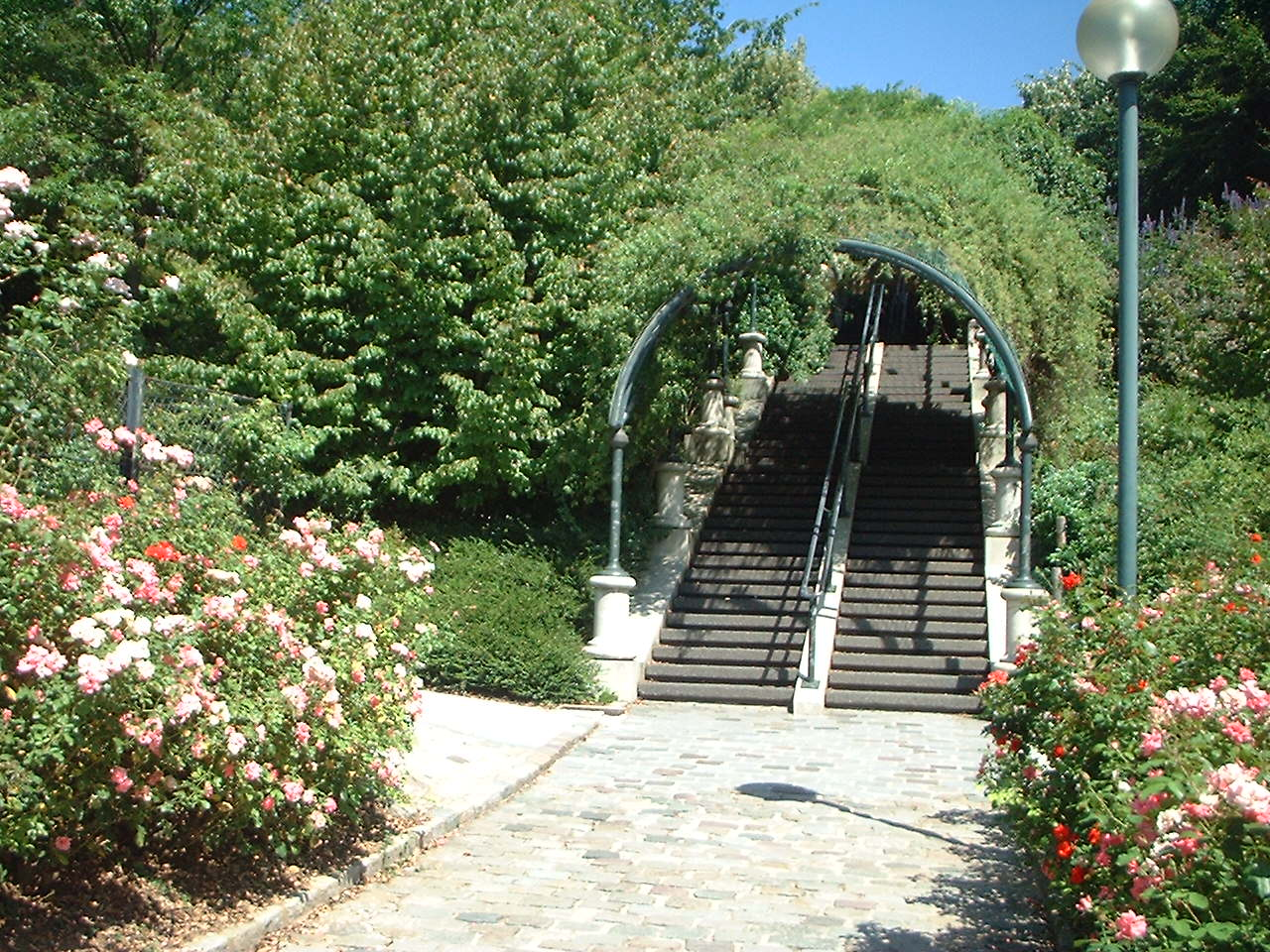 Parc de Bellville in Paris, Aufgang zur Terrasse